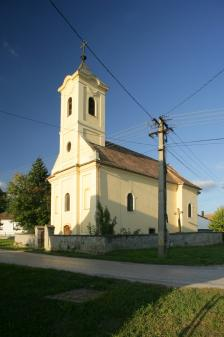 Magyarbólyi Szent Lukács evangélista szerb ortodox templom